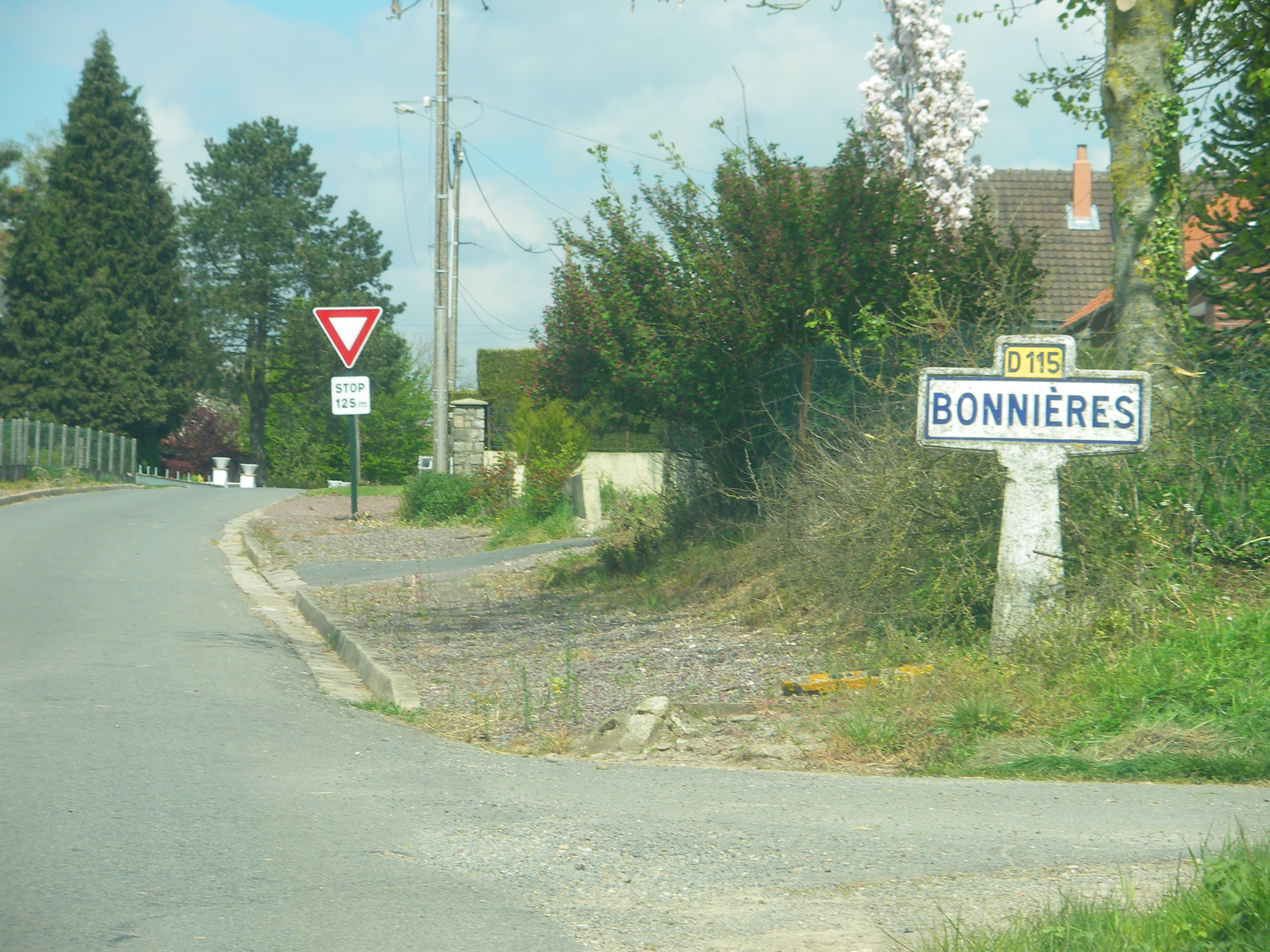 Vue d'une entrée de la commune de Bonnières, dans le Pas-de-Calais.